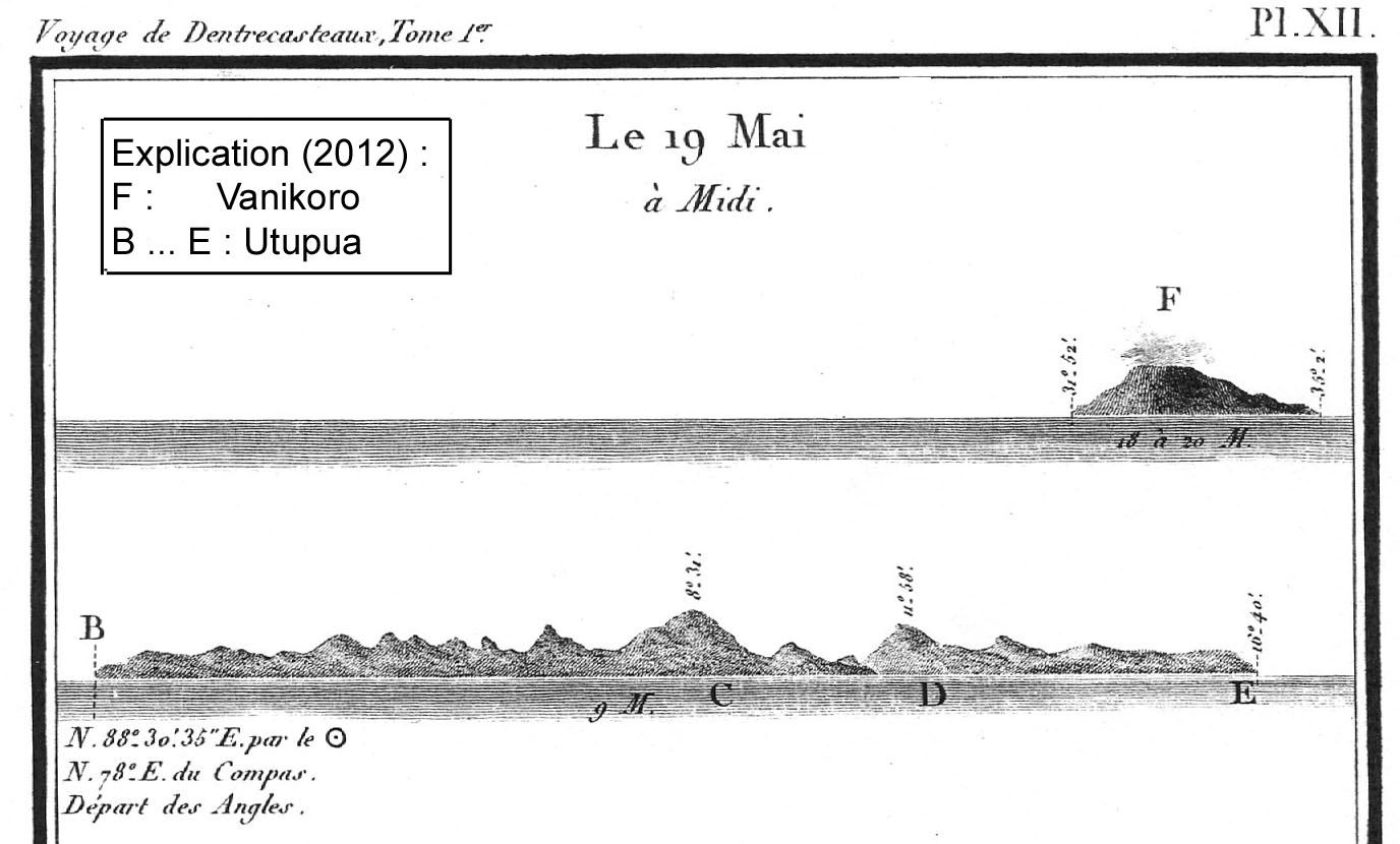 Vanikoro vue par l'expédition d'Entrecasteaux le 19 mai 1793